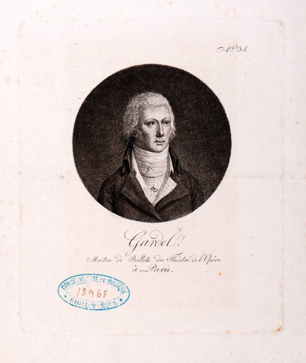 Maximilien Léopold Philippe Joseph Gardel (1741-1787)